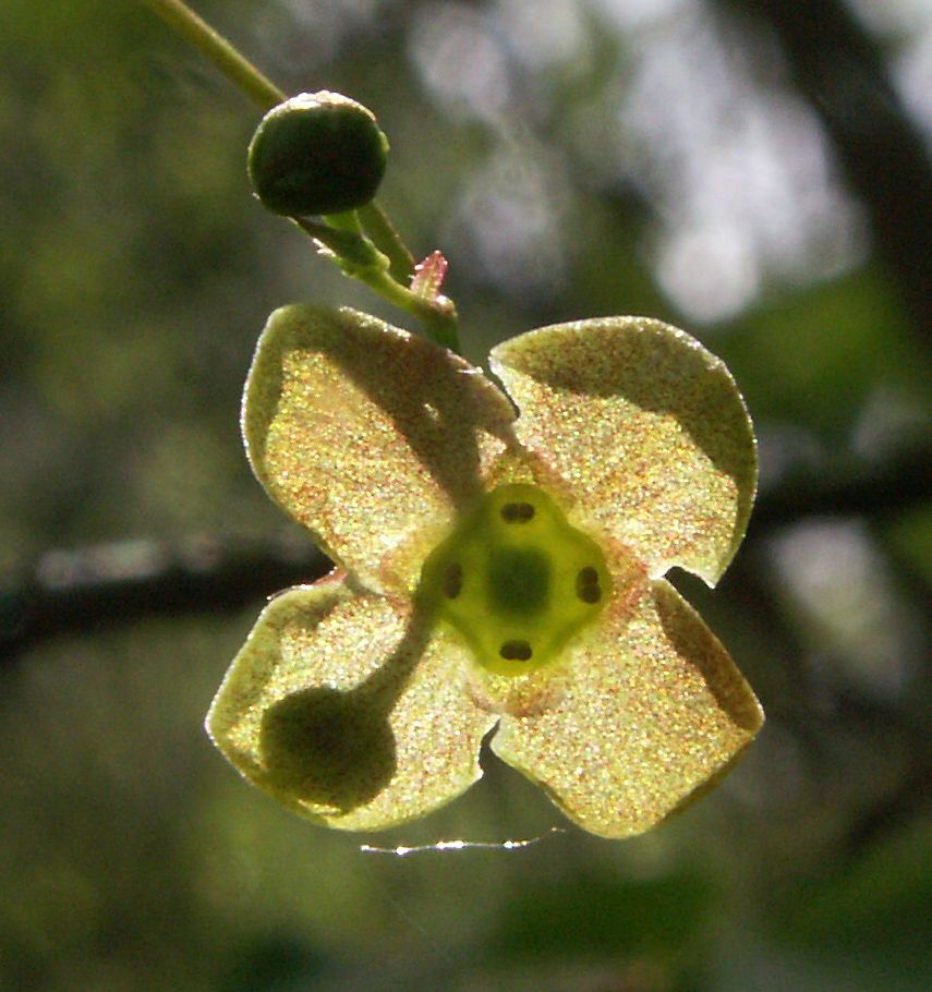 Euonymus verrucosa, blüte gegenlicht